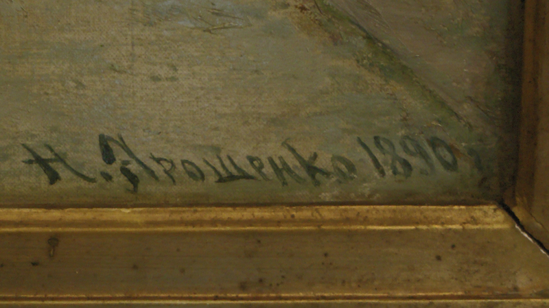 Подпись Николая Ярошенко на картине "В тёплых краях". Фотография сделана в Русском музее.